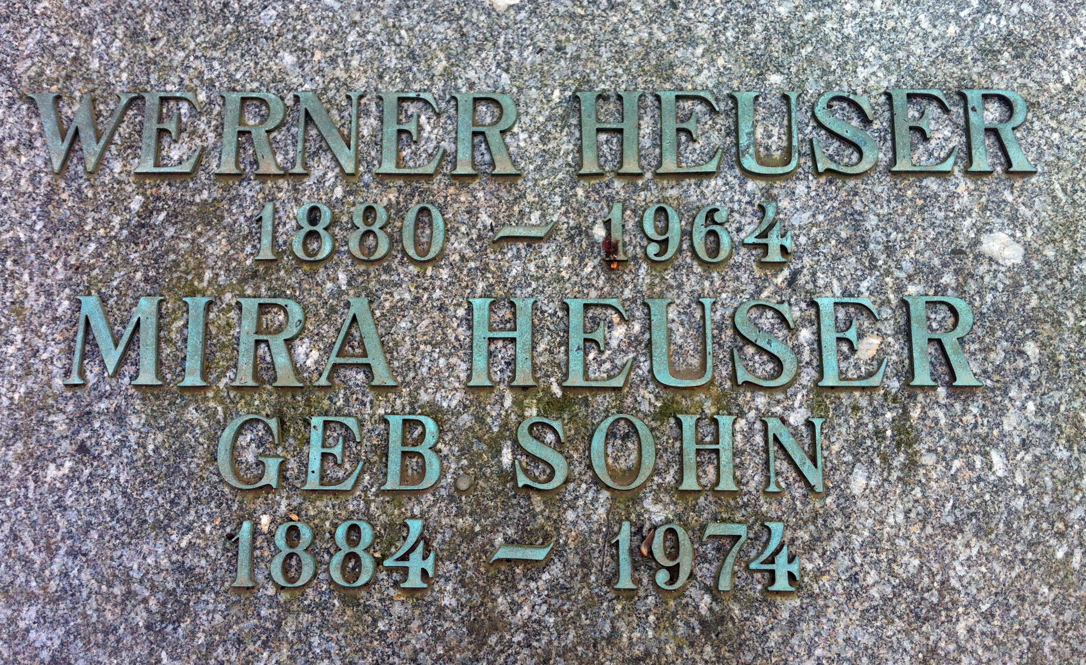 Grabstein Werner und Mira Heuser, Nordfriedhof Düsseldorf, Feld 70